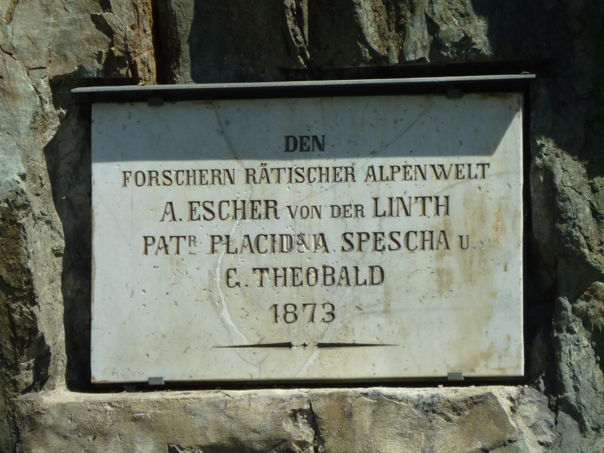 Russeinerbrücke Gedenkstein